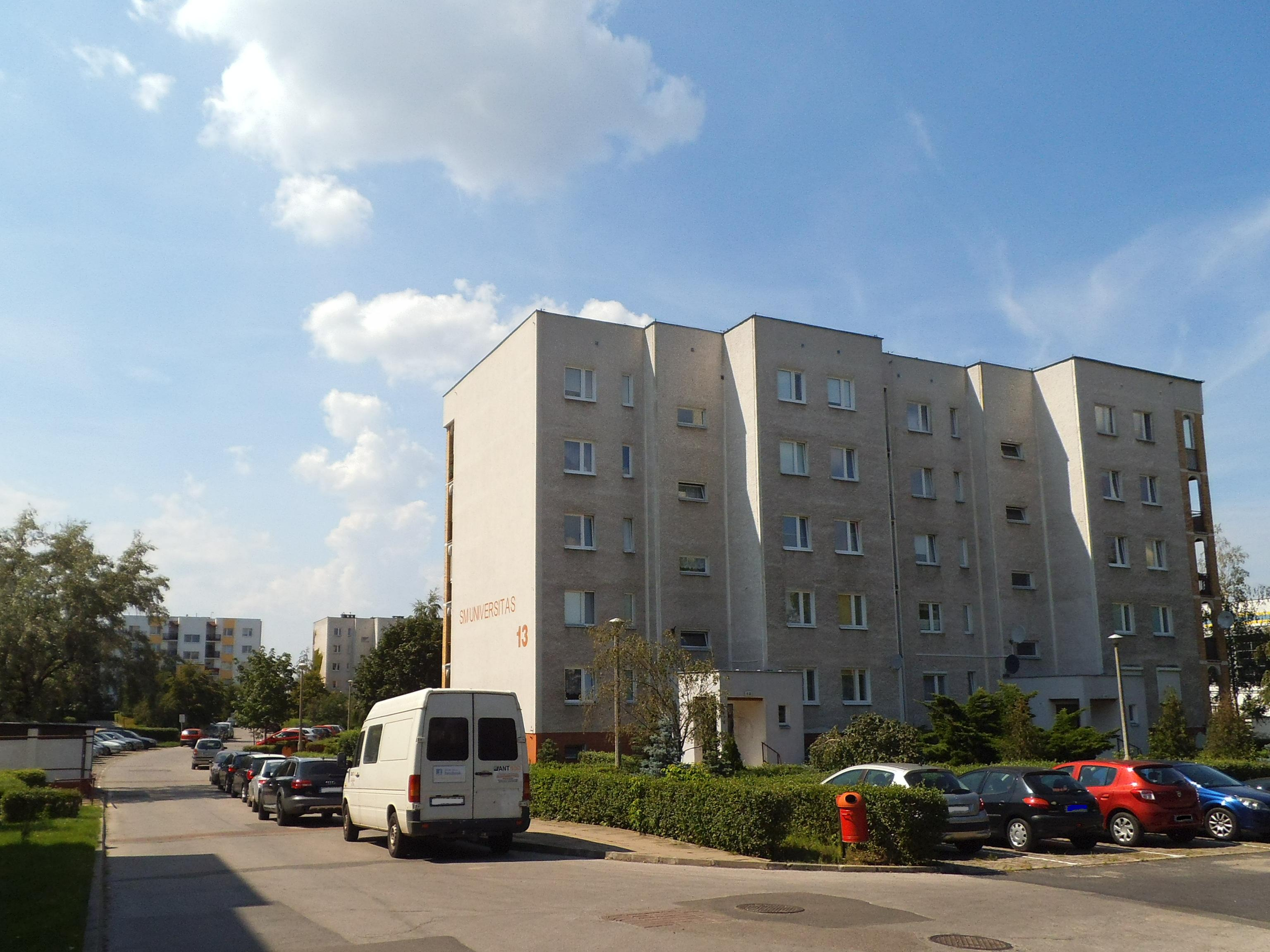 Fragment zabudowy wielorodzinnej przy ulicy św. Józefa w Toruniu